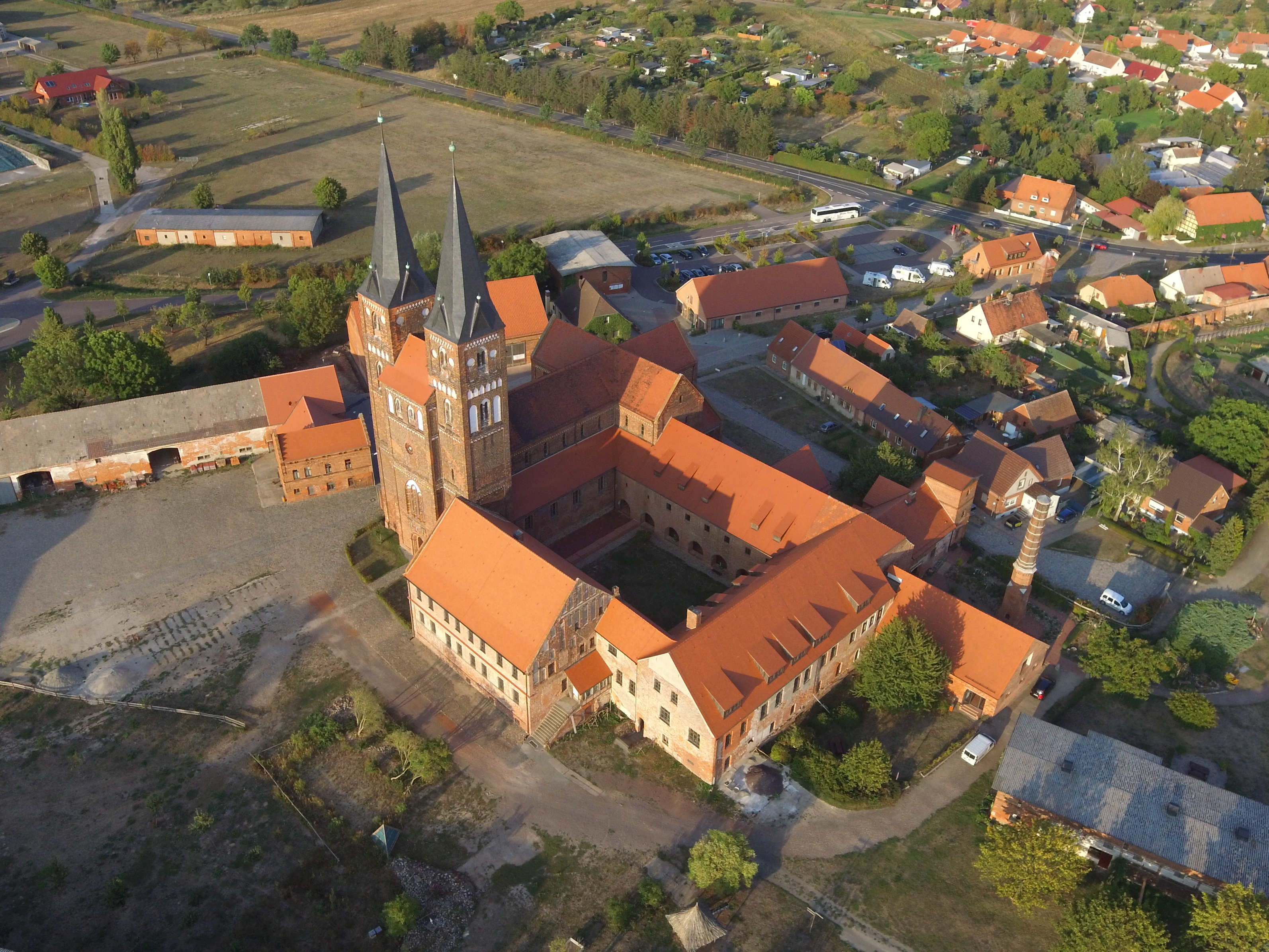 Kloster Jerichow im Luftbild